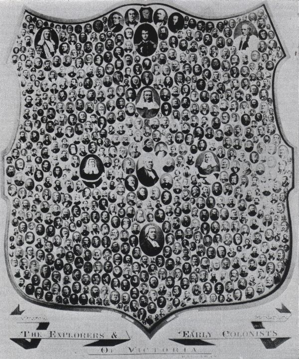 Mosaïque photographique de Thomas Foster Chuck (années 1870).